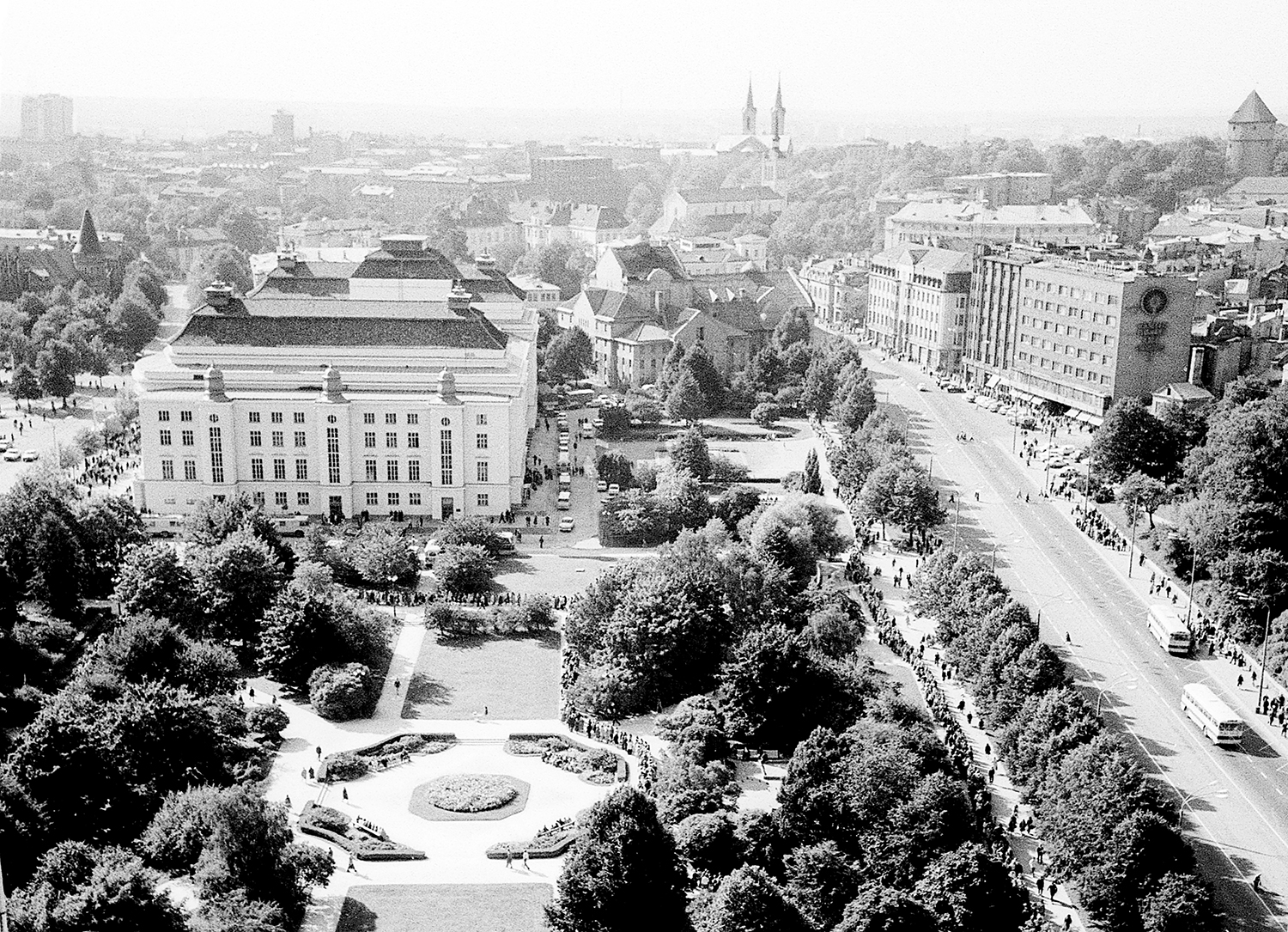 Georg Otsa matus Estonias Hotell Viru katuselt 1975